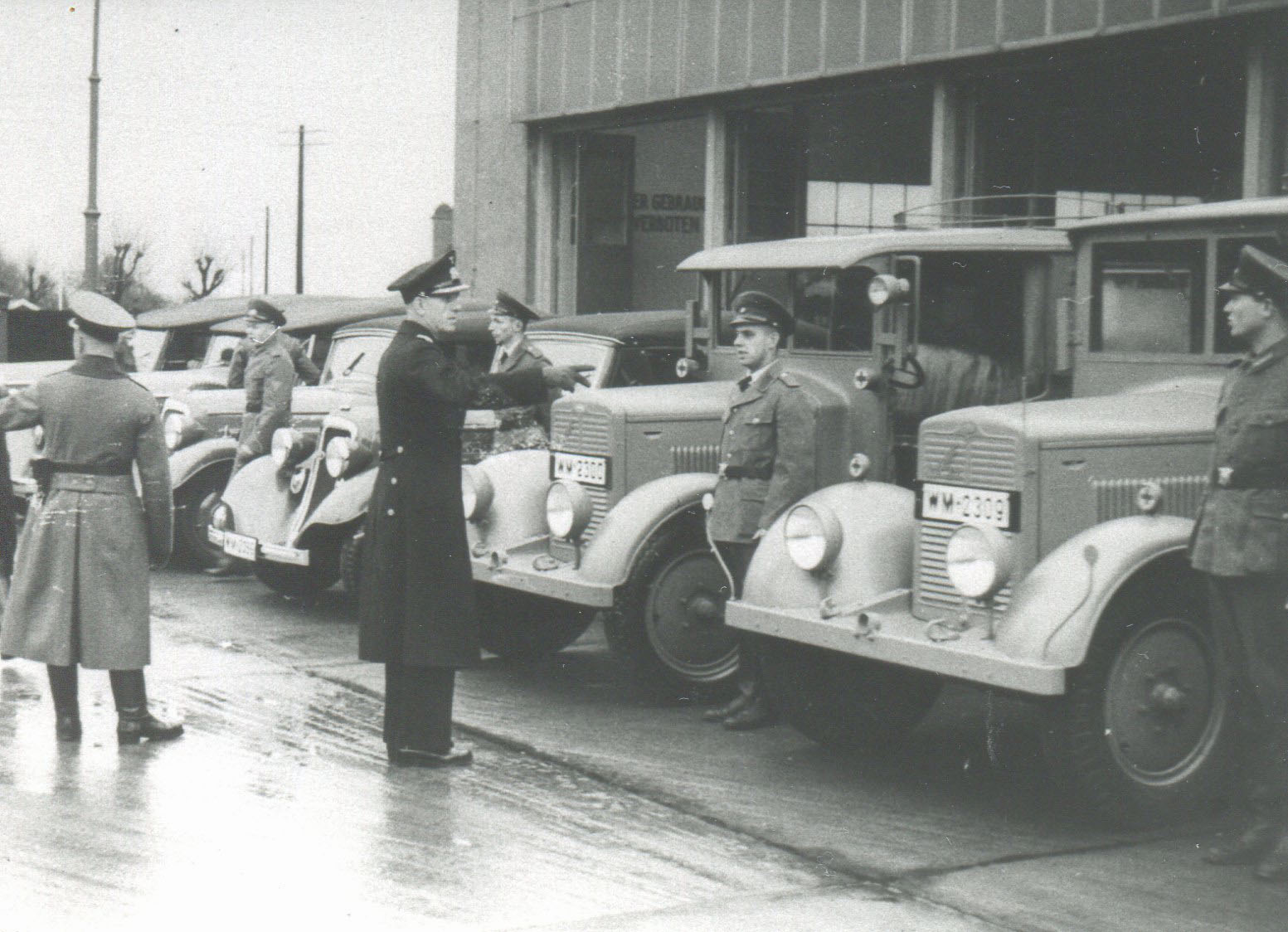 Marinefahrbereitschaft in der Roter Sand Kaserne, Bremerhaven.